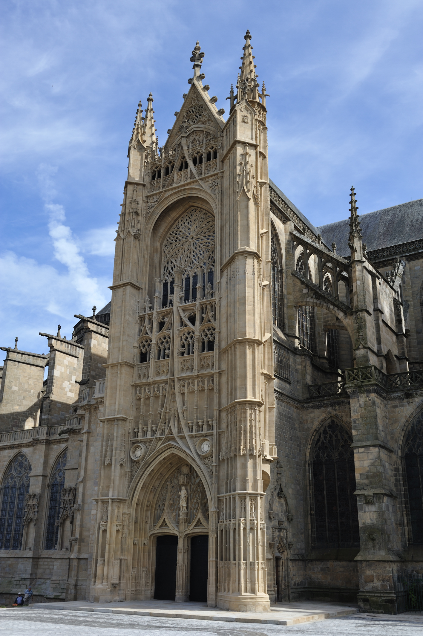 Cathédrale Saint-Étienne, Limoges, Haute-Vienne, France